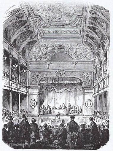 Le congrès des étudiants de Liège.